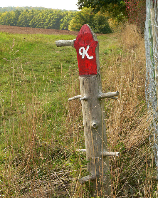 Kellerwaldschild